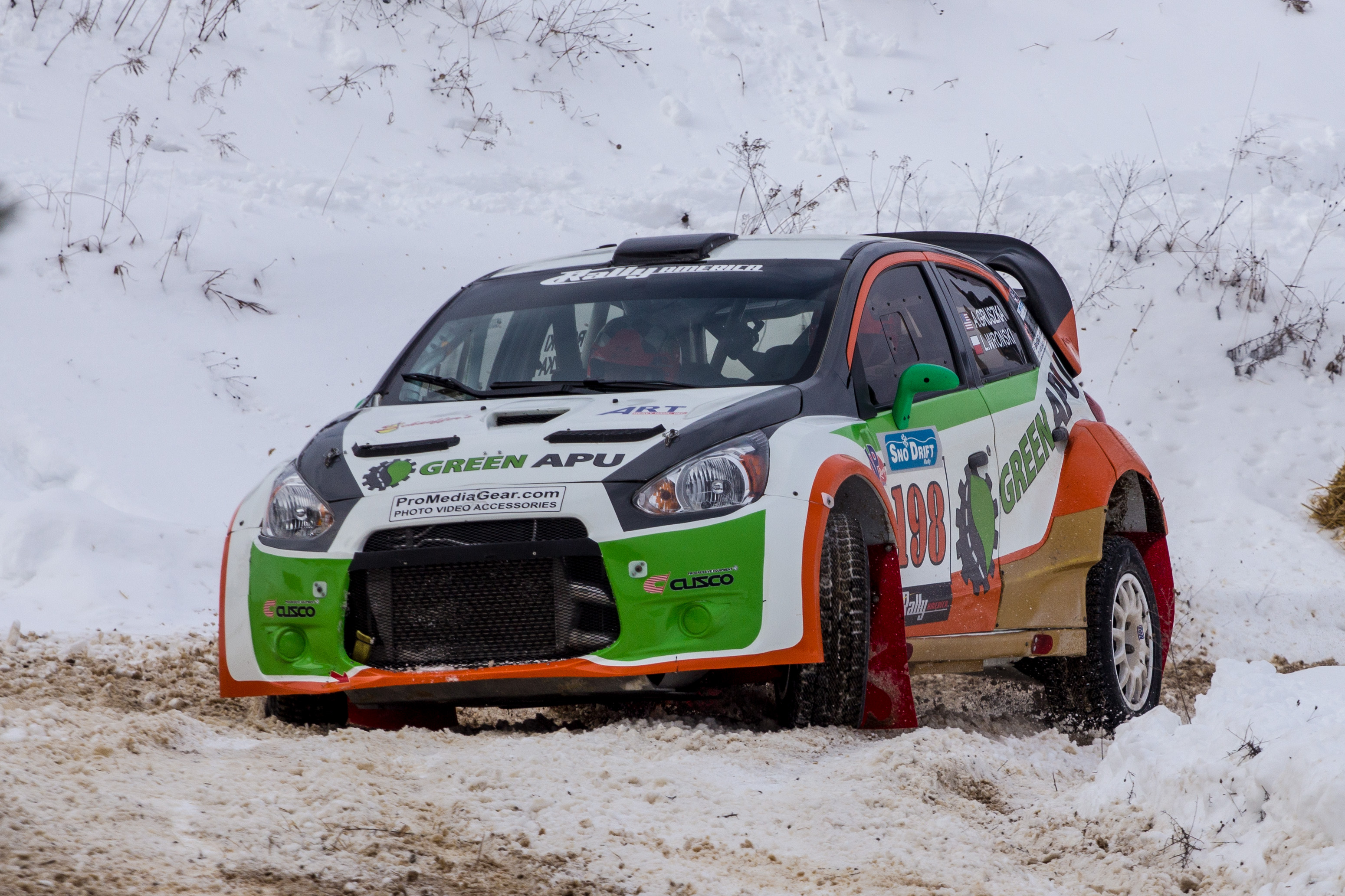 Mitsubishi R5